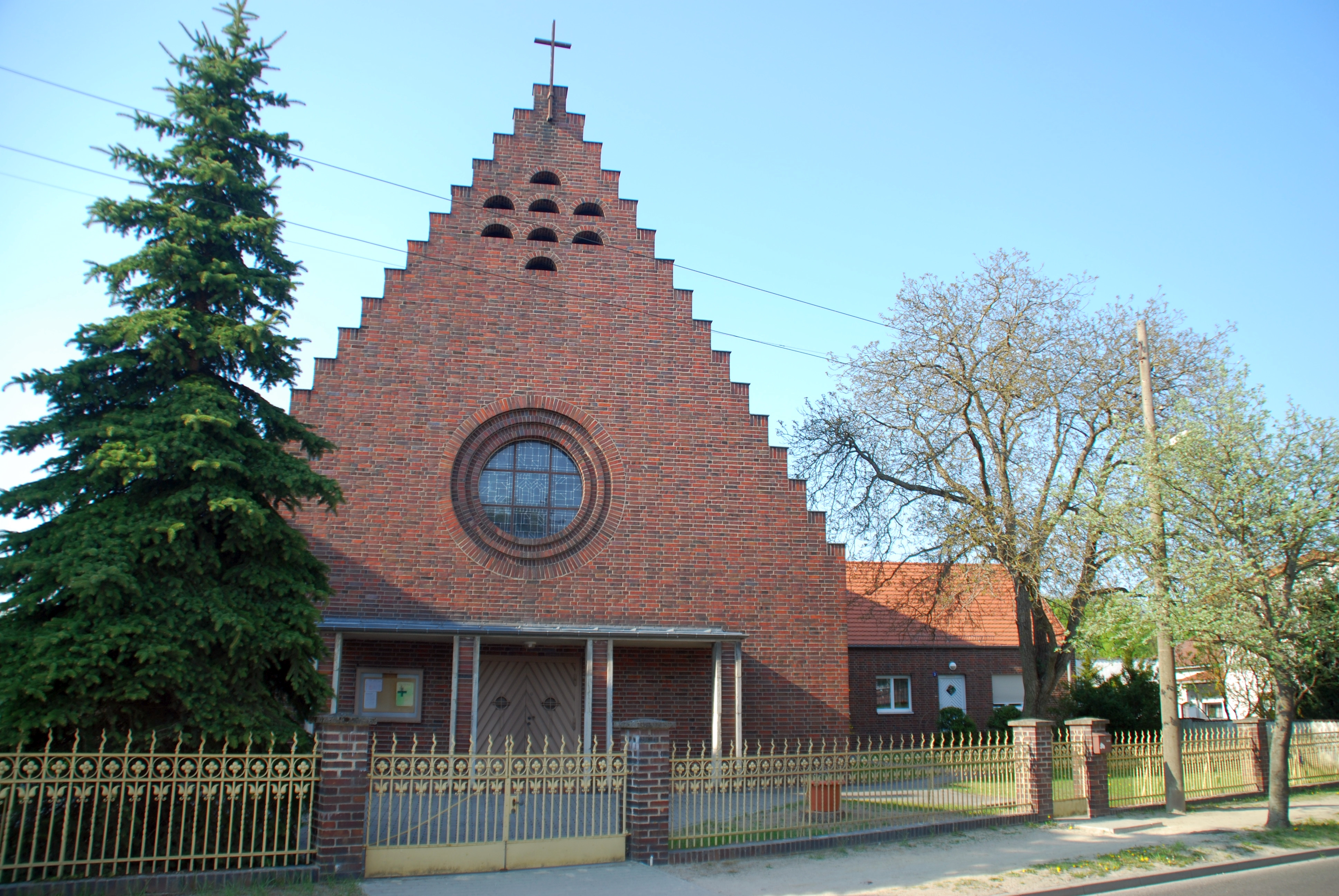 Katholische Kirche Maria Hilf mit angebautem Pfarrhaus und straßenseitiger Grundstückseinfriedung in Herzfelde